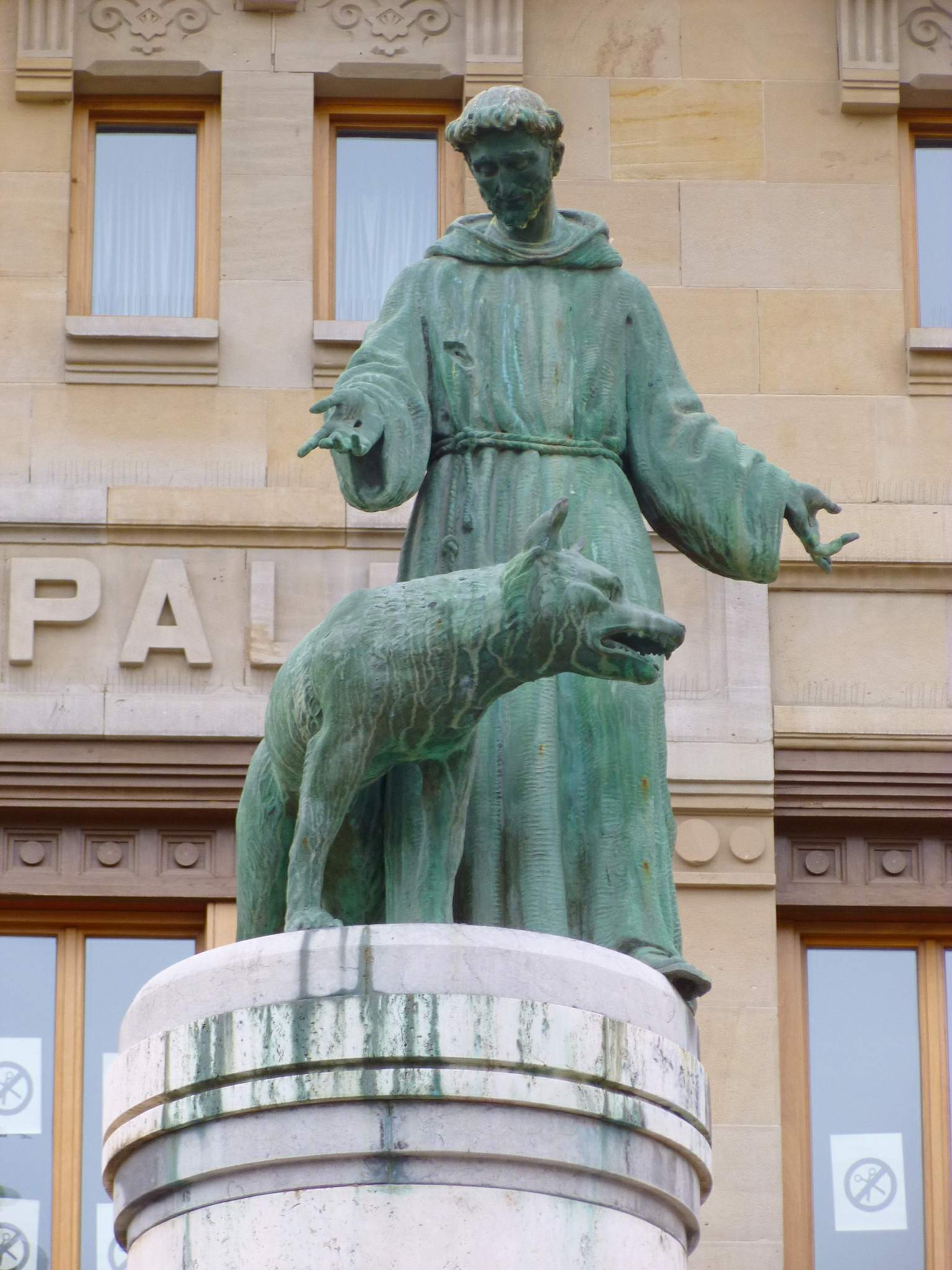 Plaza de San Francisco de Asís, monumento a San Francisco (Pamplona)